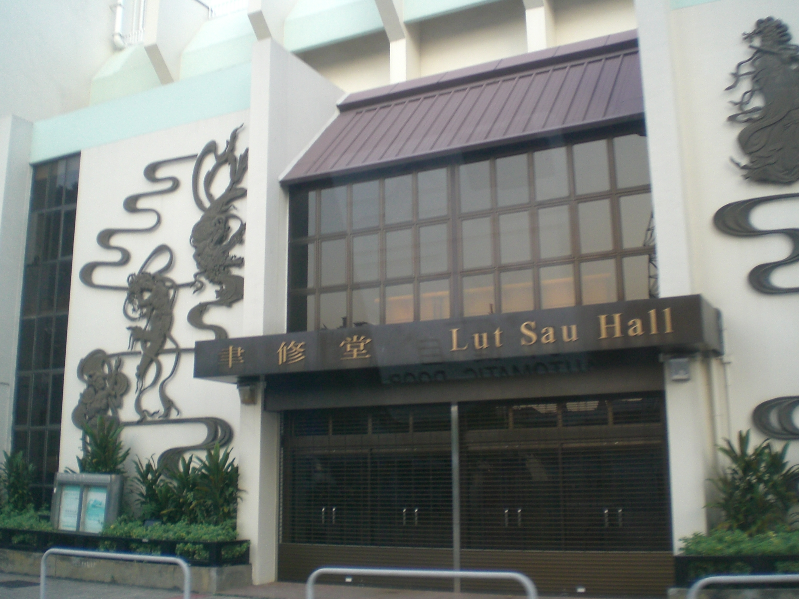 元朗趙聿修紀念中學禮堂